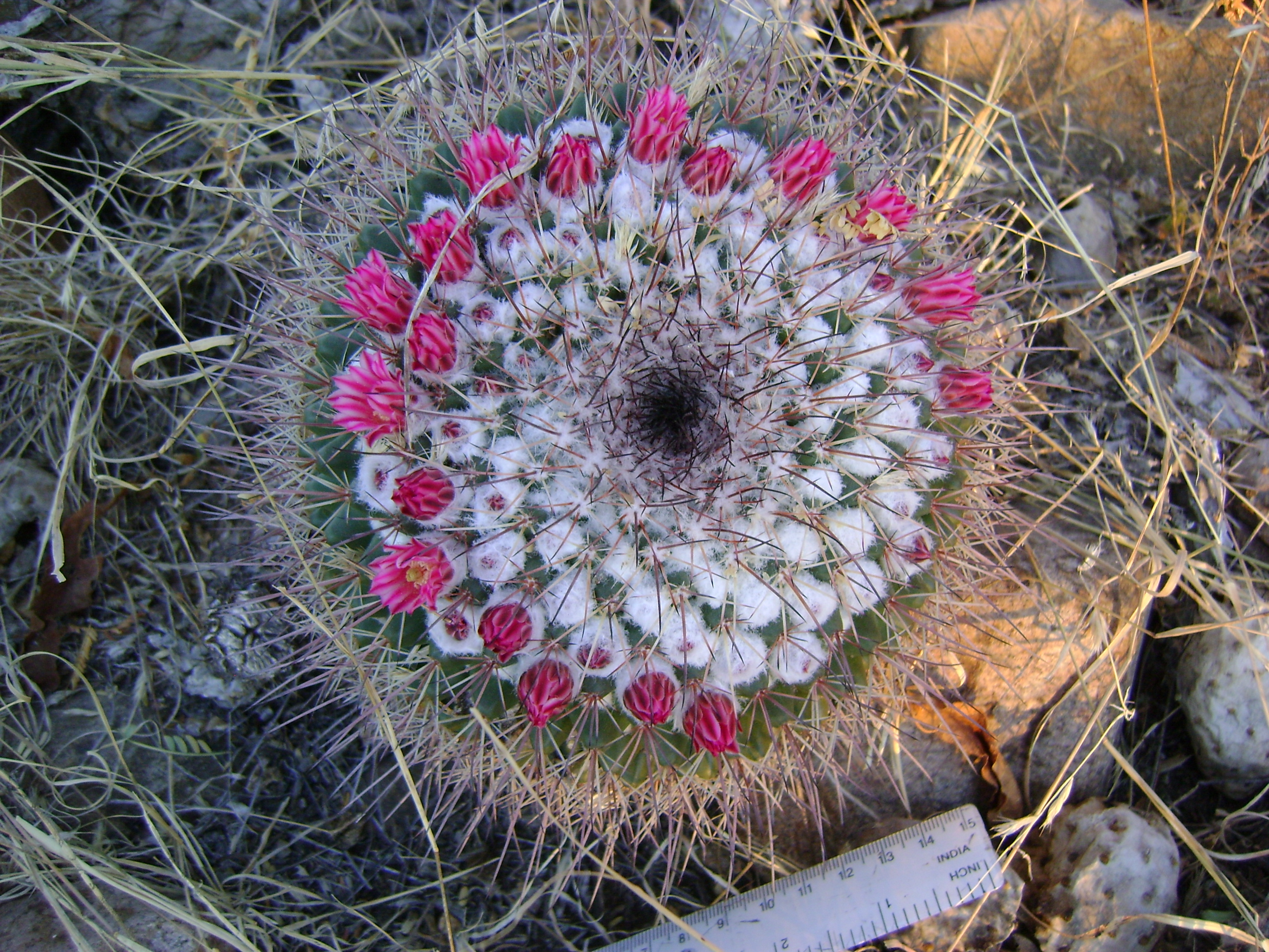 Near Calvillo, Aguascalientes